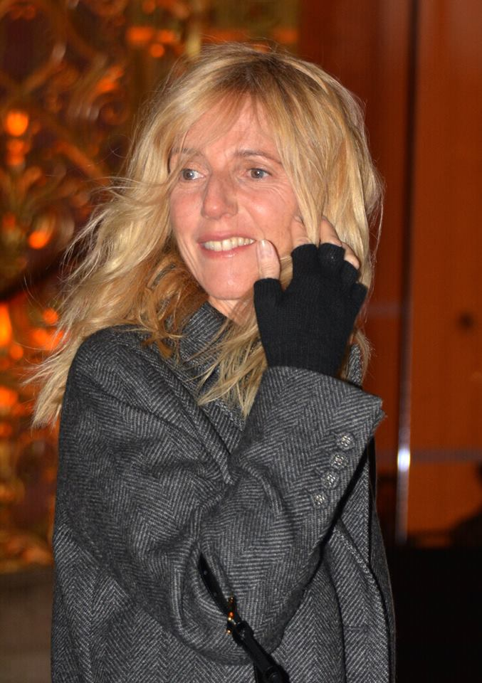 Sandrine Kiberlain au dîner des révélations des César du cinéma